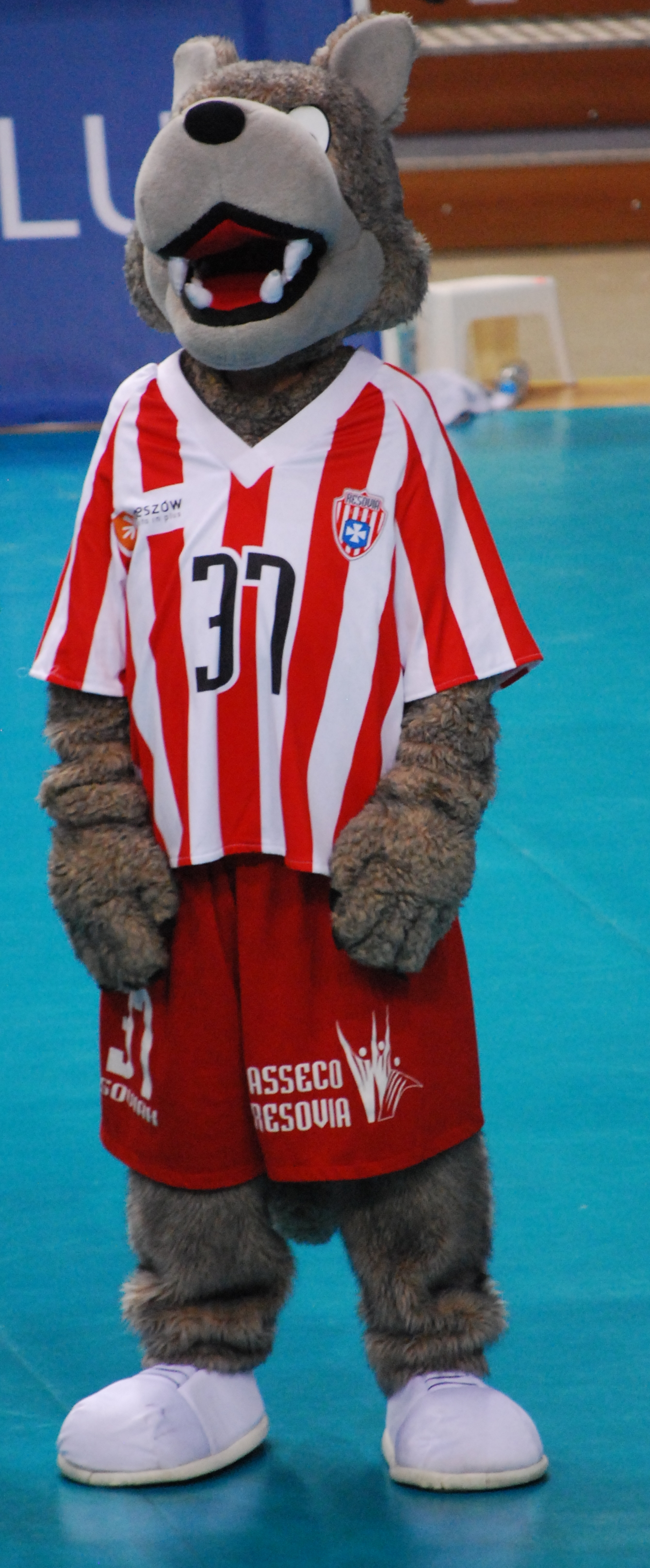 Soviak - maskotka drużyny siatkarskiej Asseco Resovii Rzeszów